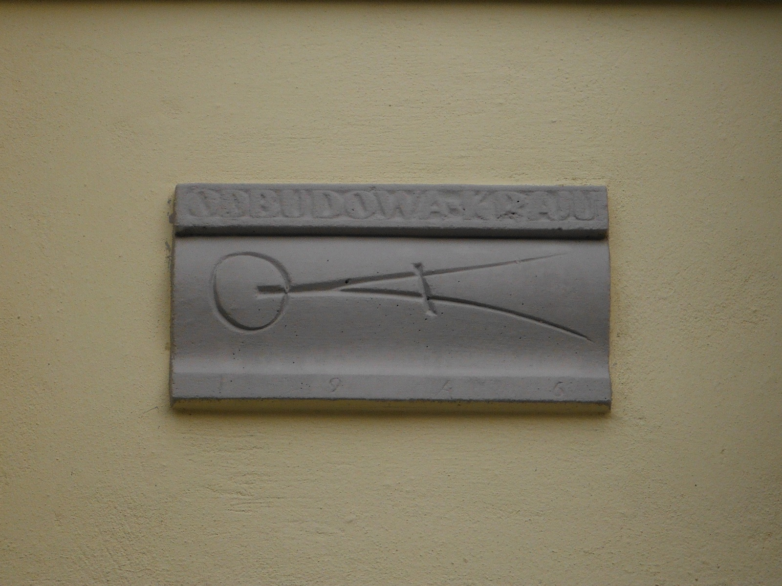 Gmerk Biura Odbudowy Stolicy na fasadzie budynku przy ul. Katowickiej 8A w Warszawie.